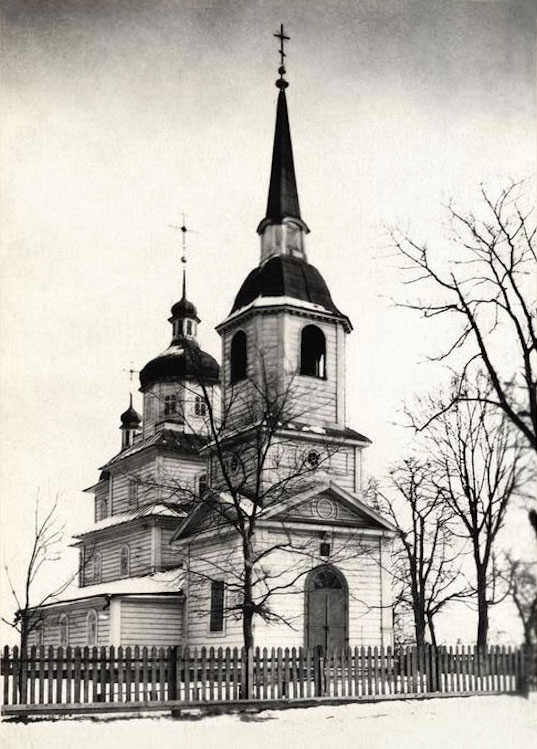 Беларуская (тарашкевіца): Слуцак (Słucak), Востраў (Vostraŭ). Царква Сьвятога Міхала Арханёла.